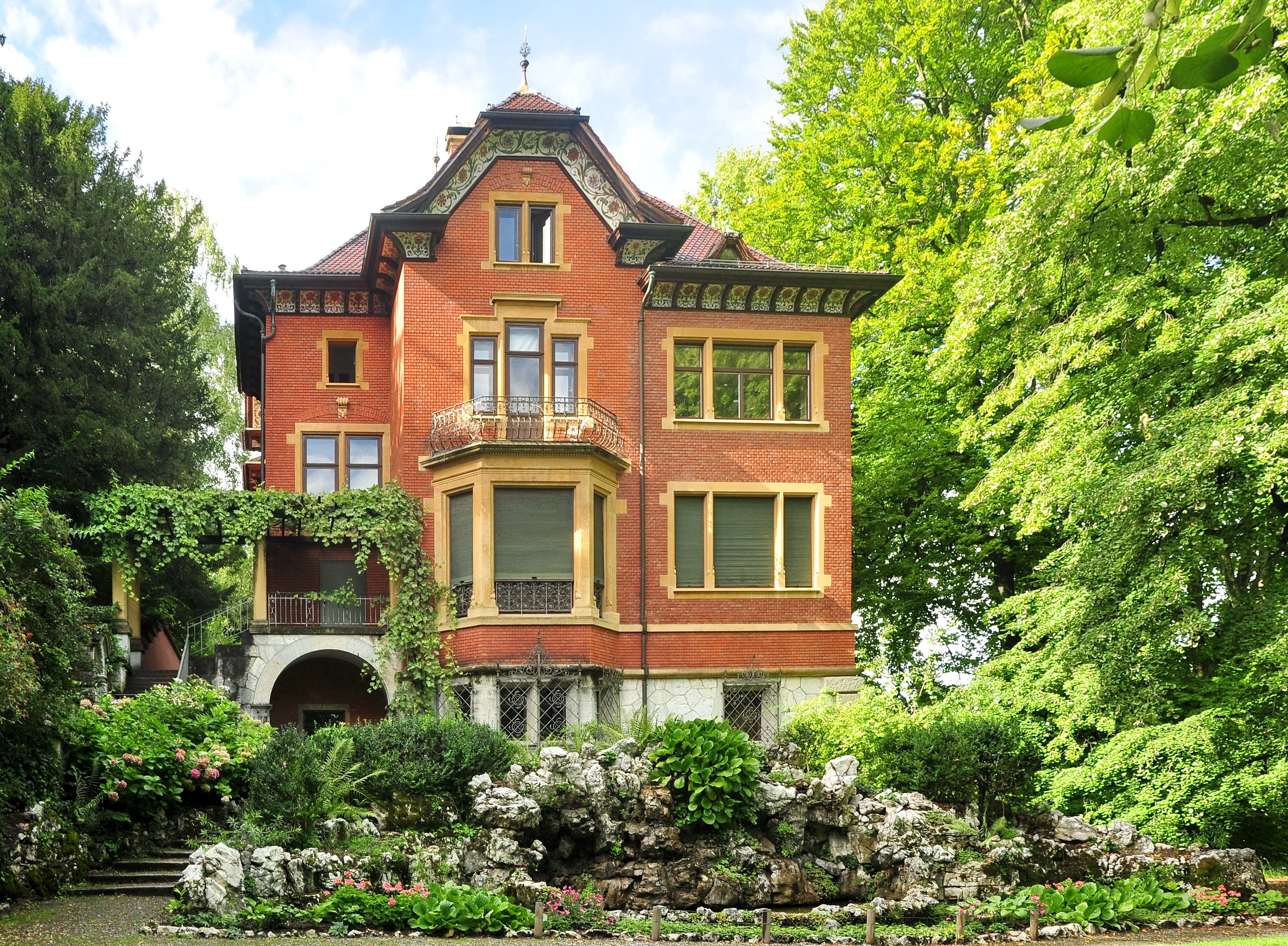 Rieterpark, Park-Villa Rieter in Zürich (Switzerland)